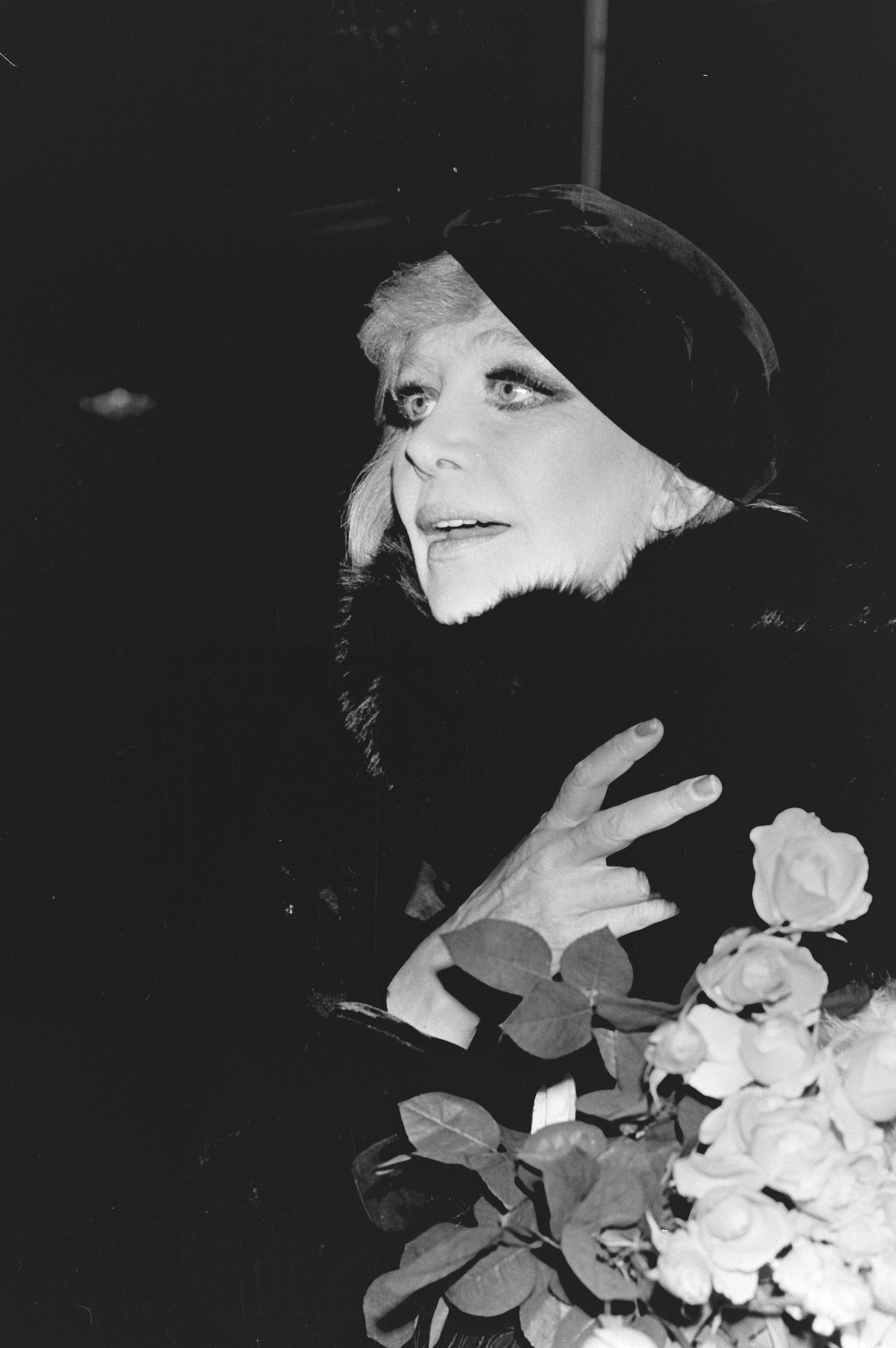 Hildegard Knef während ihrer Welttournee in den Niederlanden